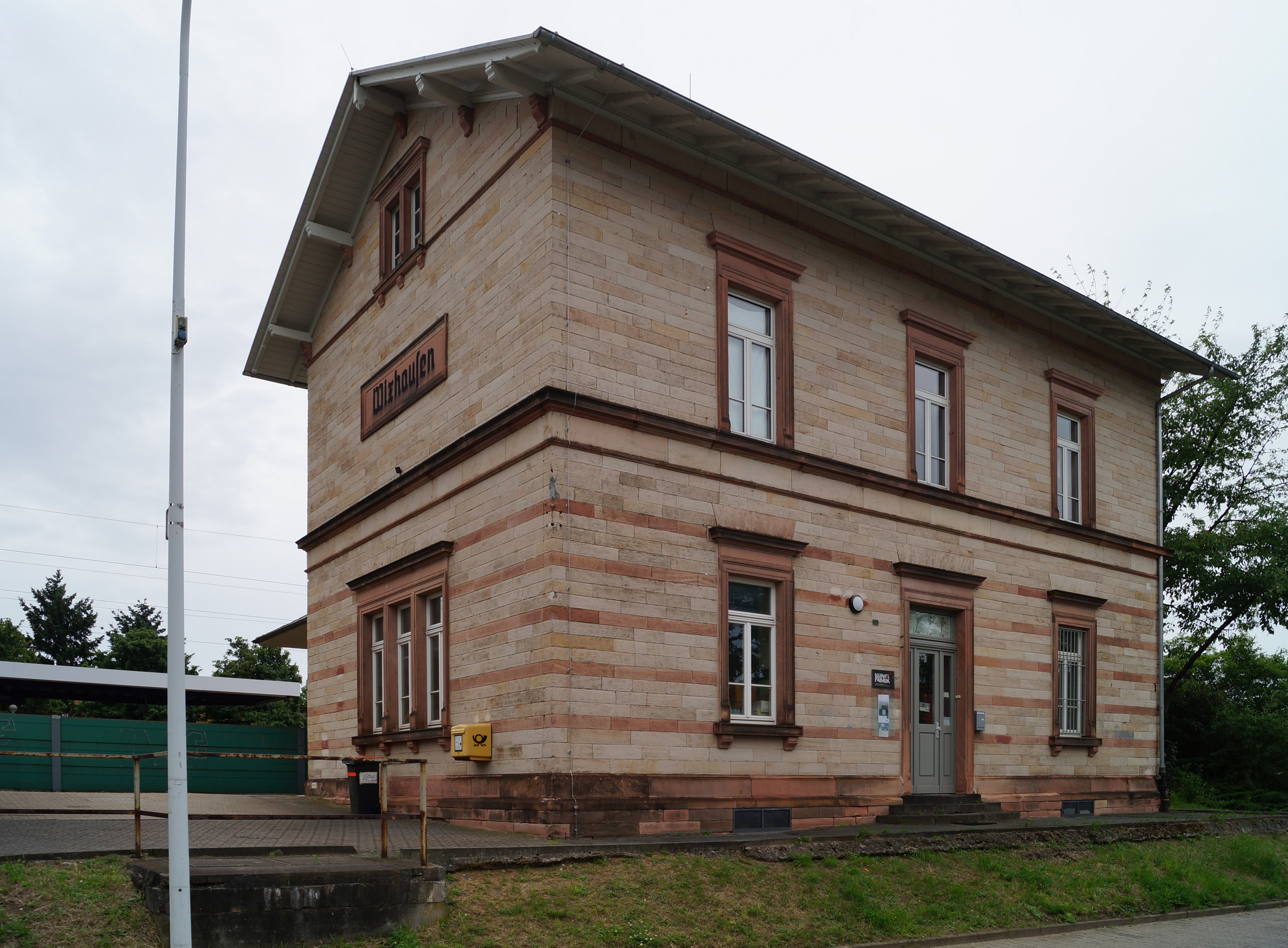 Das Bahnhofsgebäude des Darmstadt-Wixhausener Bahnhofs